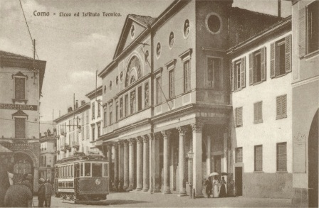 Como, liceo e istituto tecnico